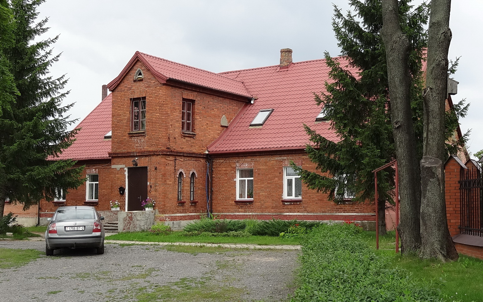 касцельная плябанія / Priest house / костёльная плебания